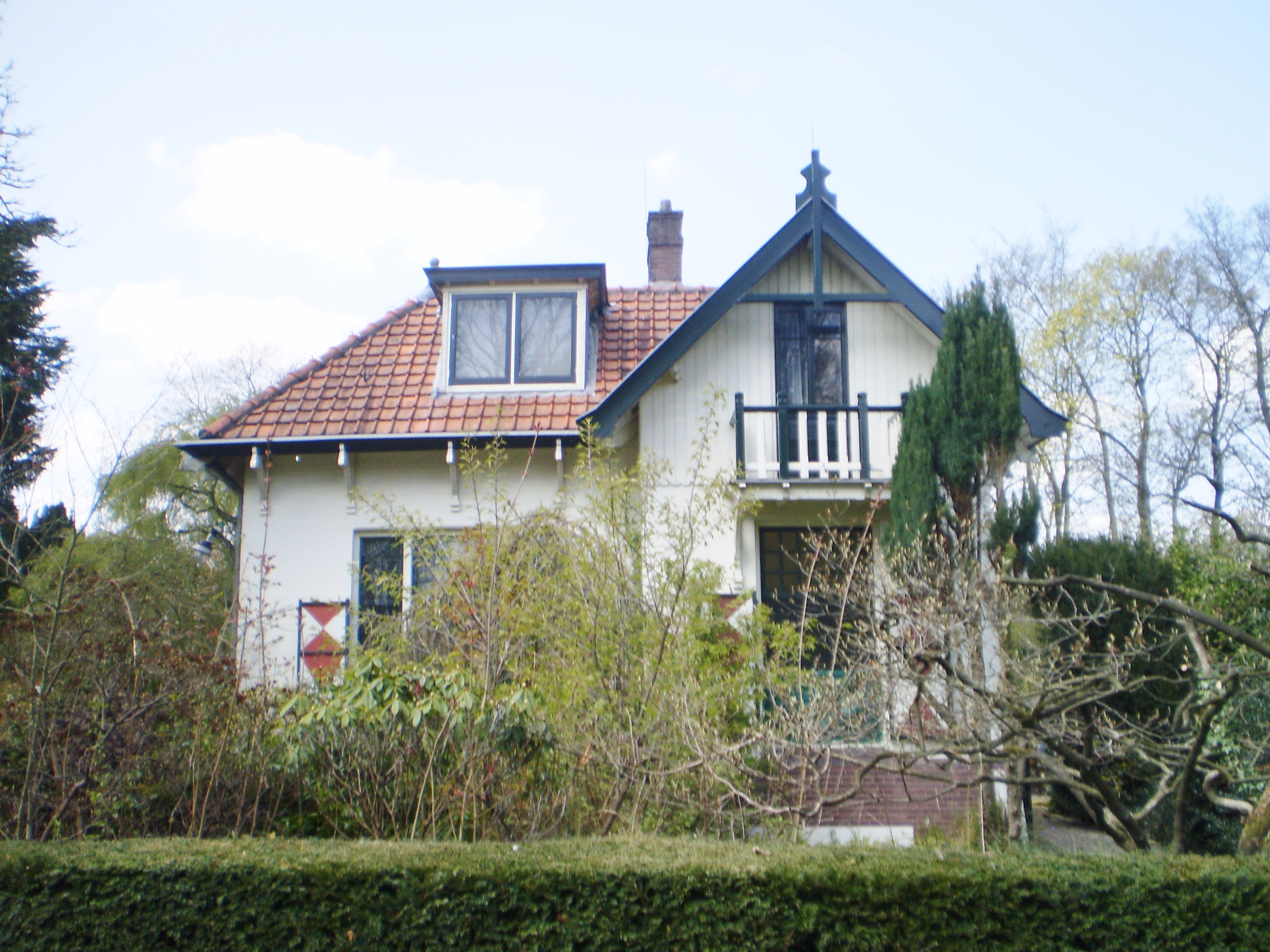 voorzijde huis